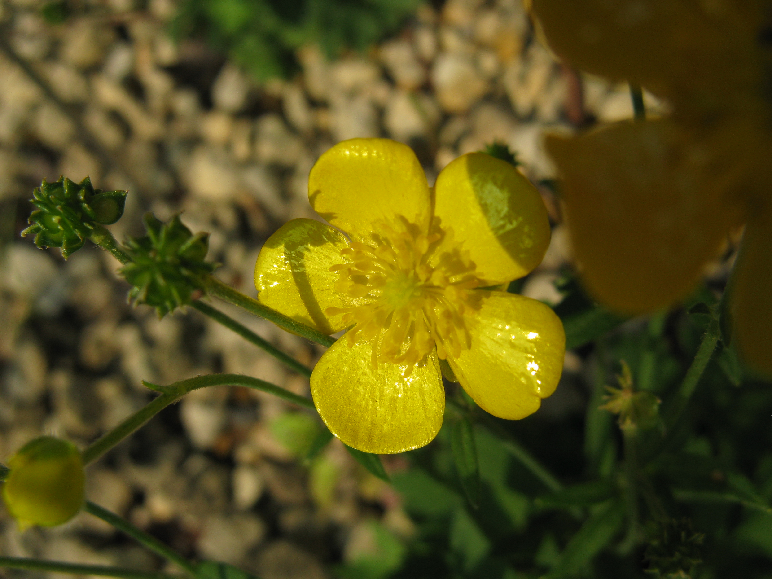 Ranunculus gouanii Place:Osaka Prefectural Flower Garden,Osaka,Japan